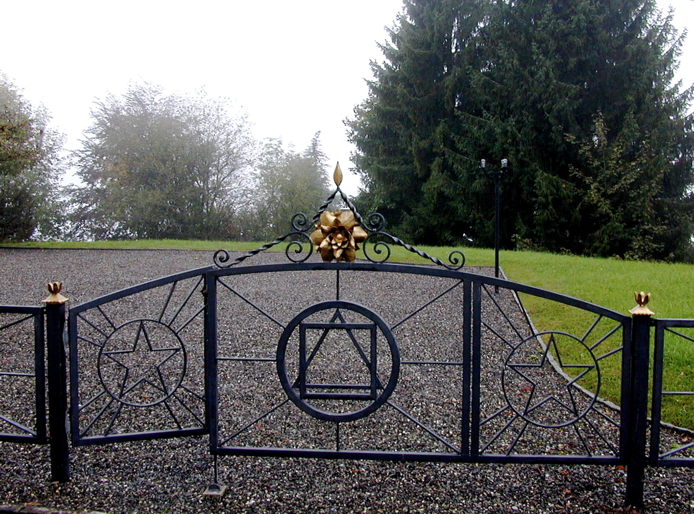 Photo personnelle d'un Centre Rosicrucien